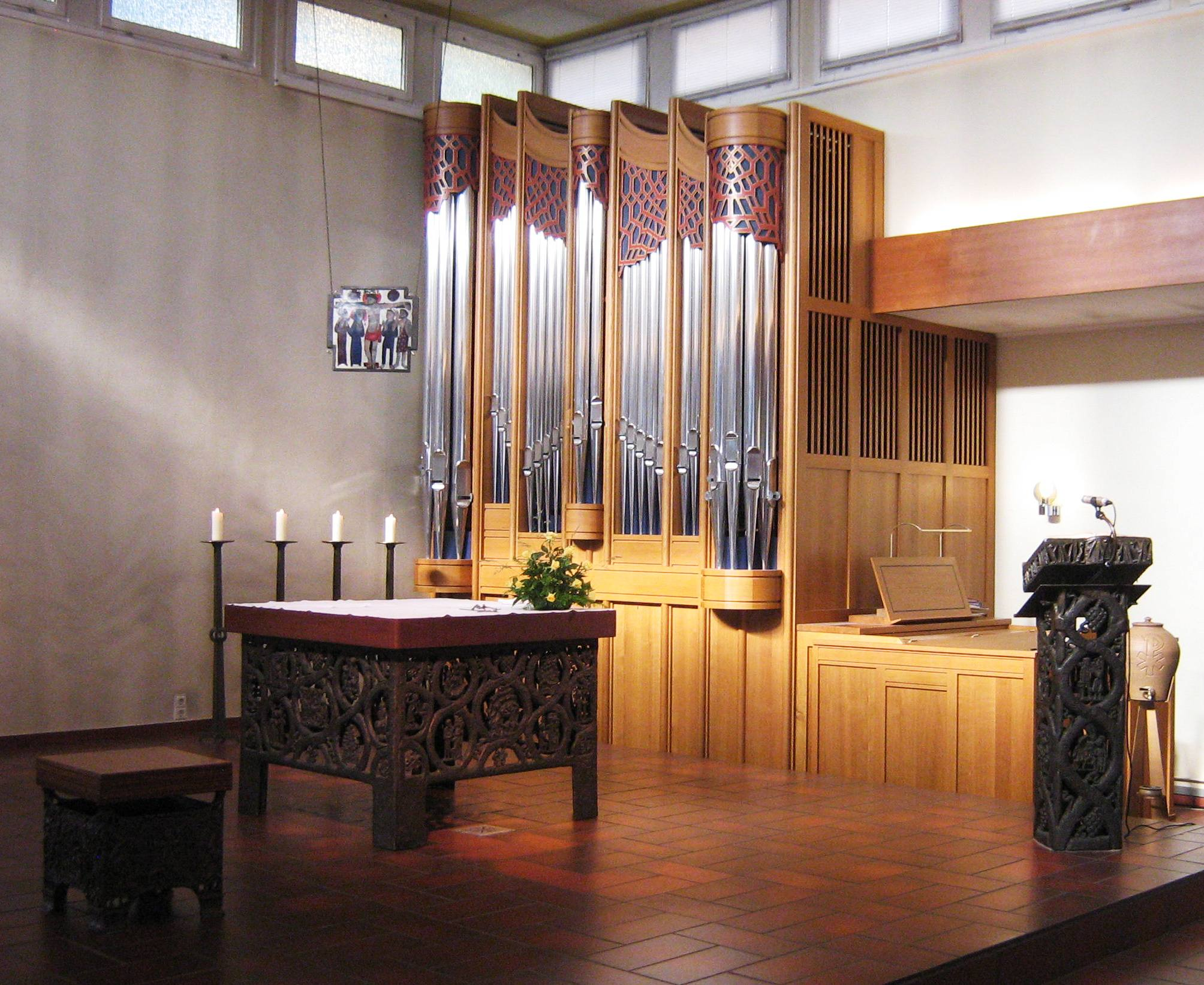 Kath. Gemeindezentrum St. Lambertus, Berlin-Hakenfelde. Altarraum